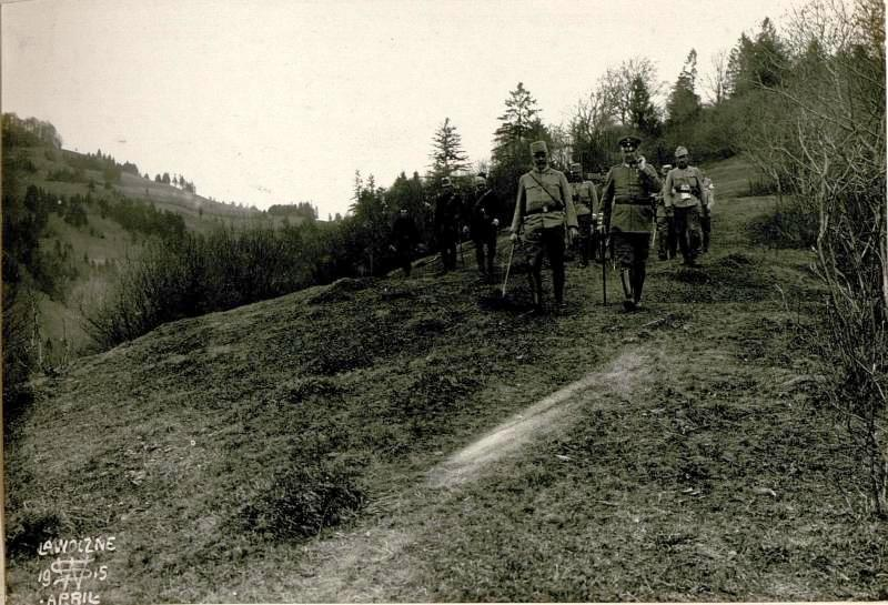 Erzh. Franz Salvator und Armeekommandant Lisingen bei Slawsko-Lawoczne in 1915